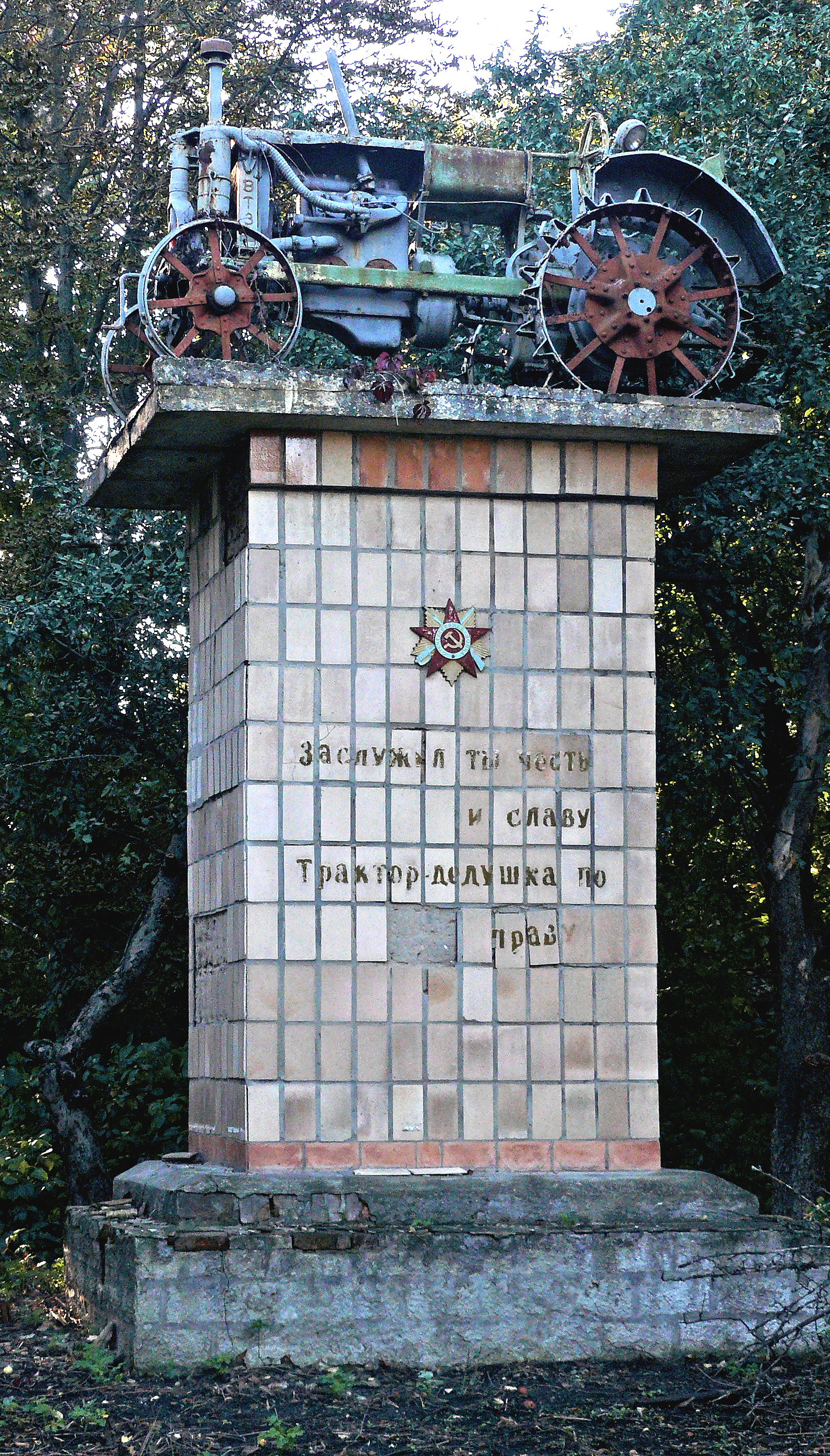 Пам’ятник трудової Слави – трактор “Універсал”, Пирятин, вул. Червоноармійська, 94